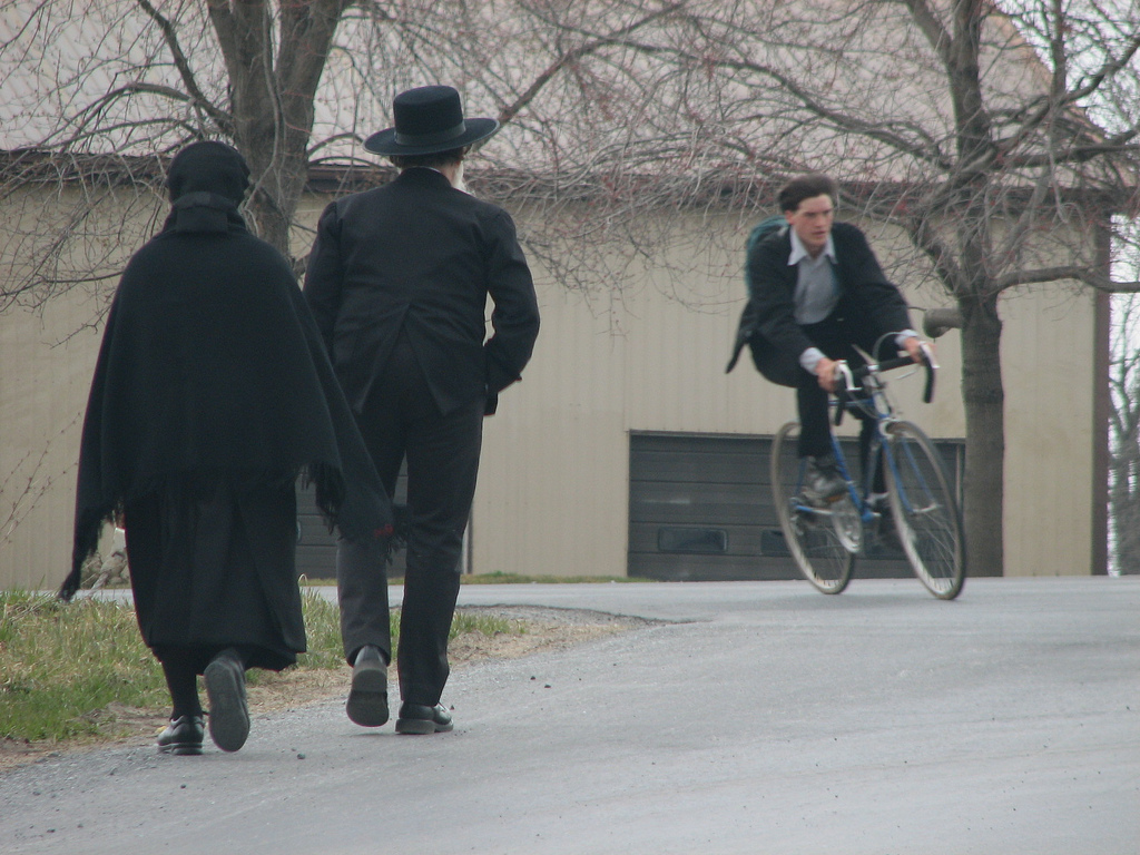 Walking and biking